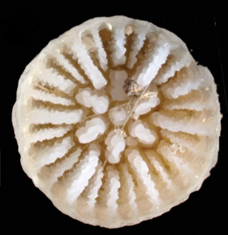 Recorte de ZooKeys-227-001-g013 para aislar vista calicular de Stenocyathus